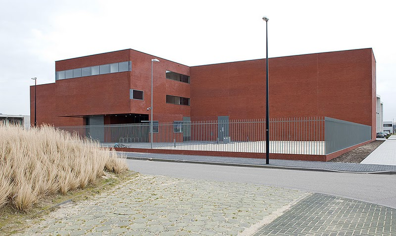 Het Collectiecentrum van het Amsterdam Museum, wordt eind 2011 officieel geopend.